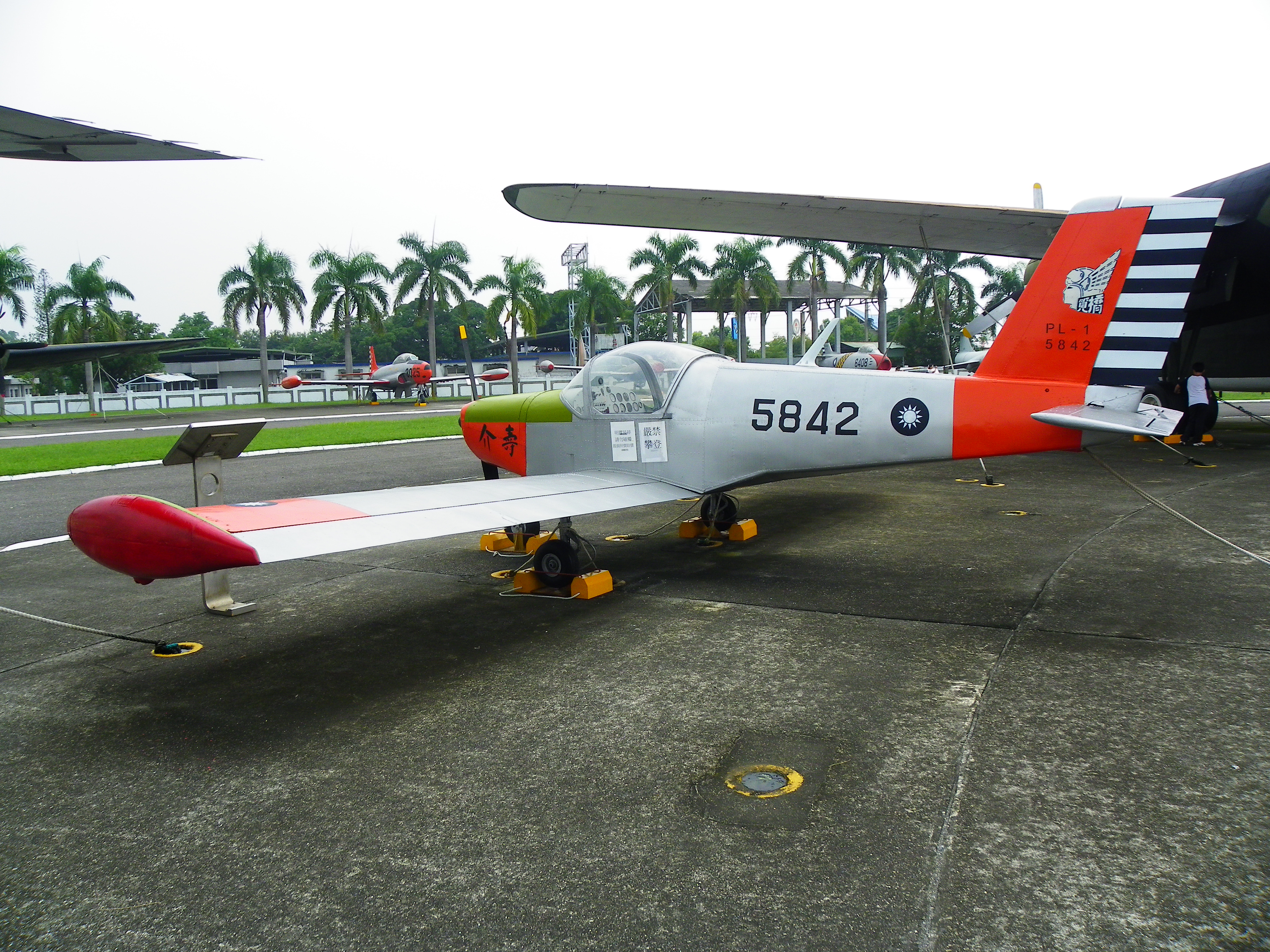 中華民國空軍介壽號初級教練機左側，